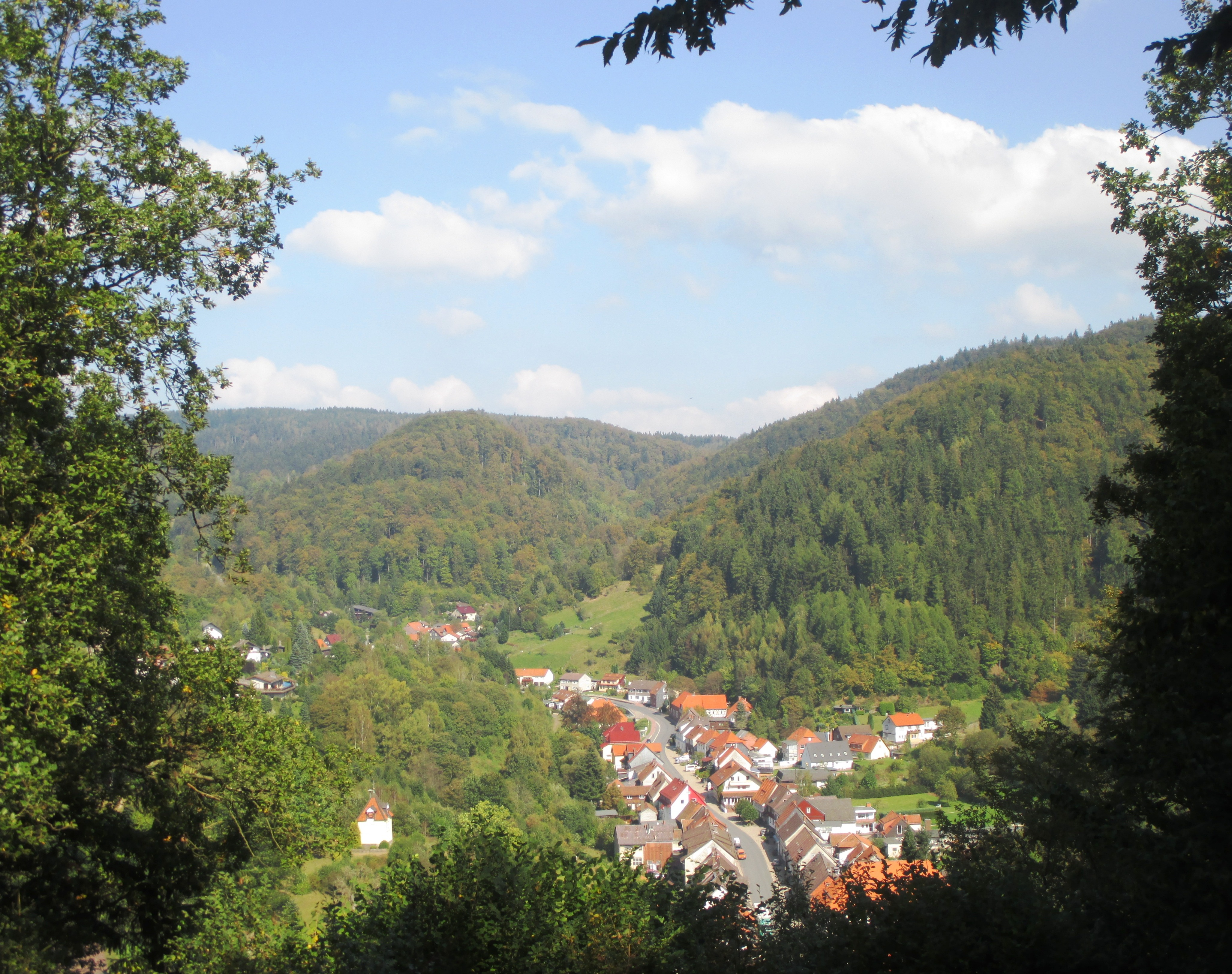 Blick auf Wieda vom Aussichtspunkt Alte Wache